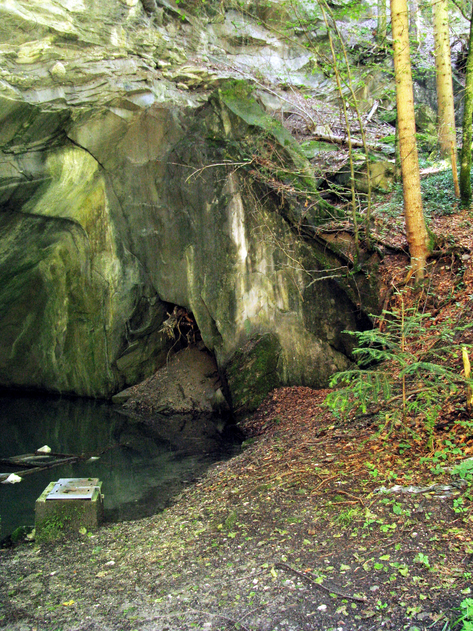 Ehemaliger Steinbruch am Grenzbach; amtlich ausgewiesenes Geotop mit der Nummer 190A007.